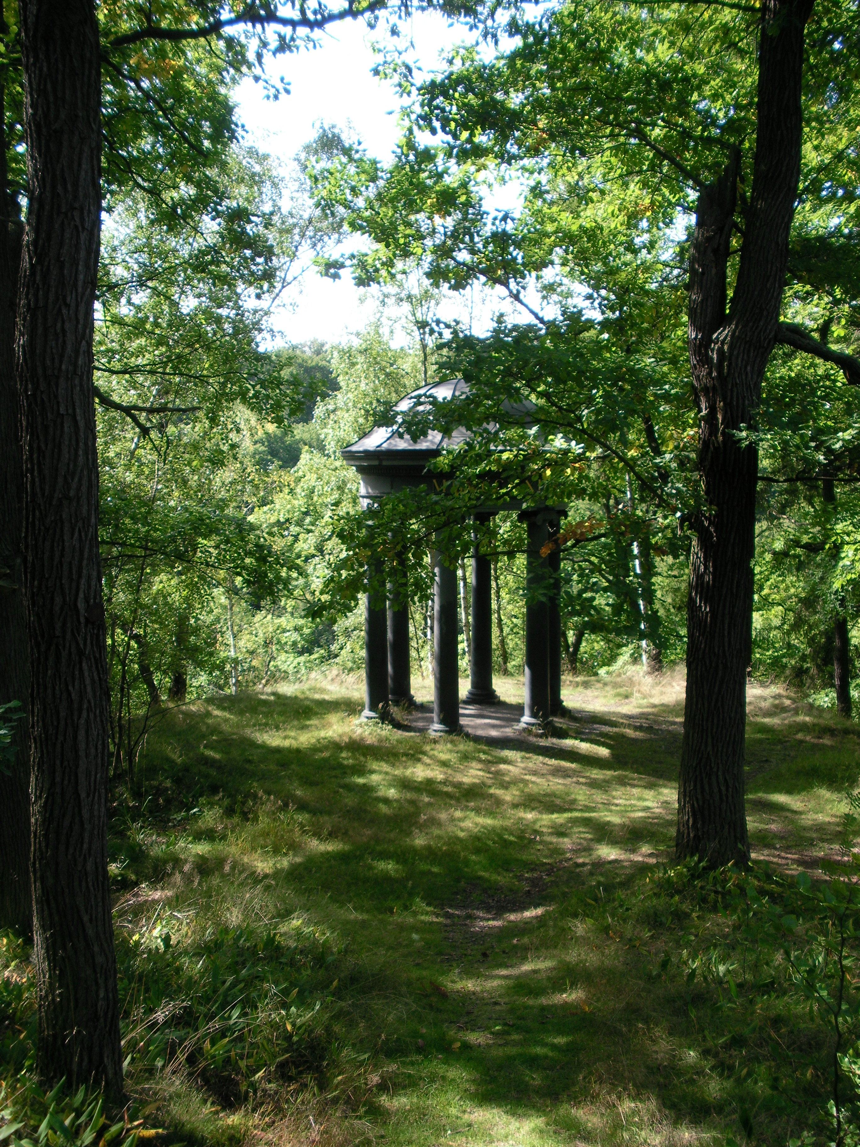 Luisentempel bei Alexisbad